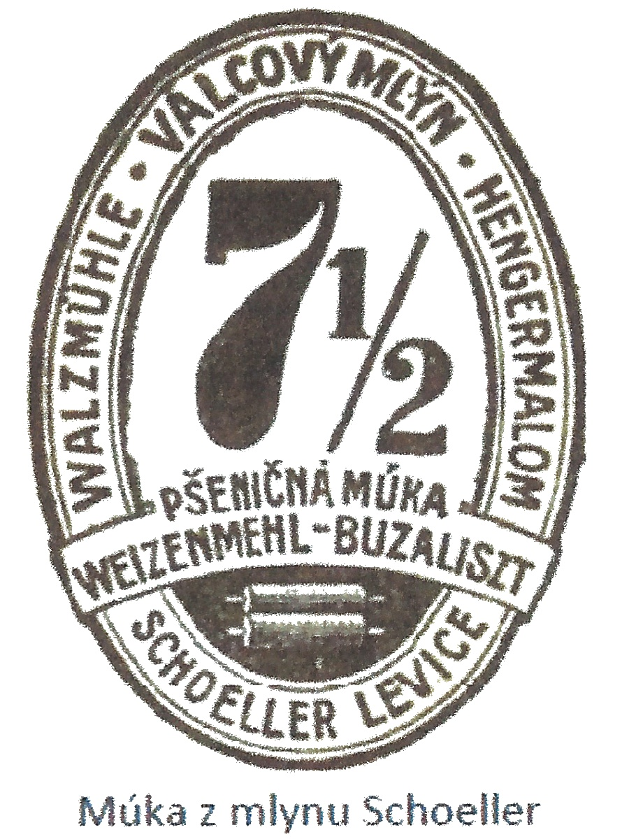 Múka Schoeller